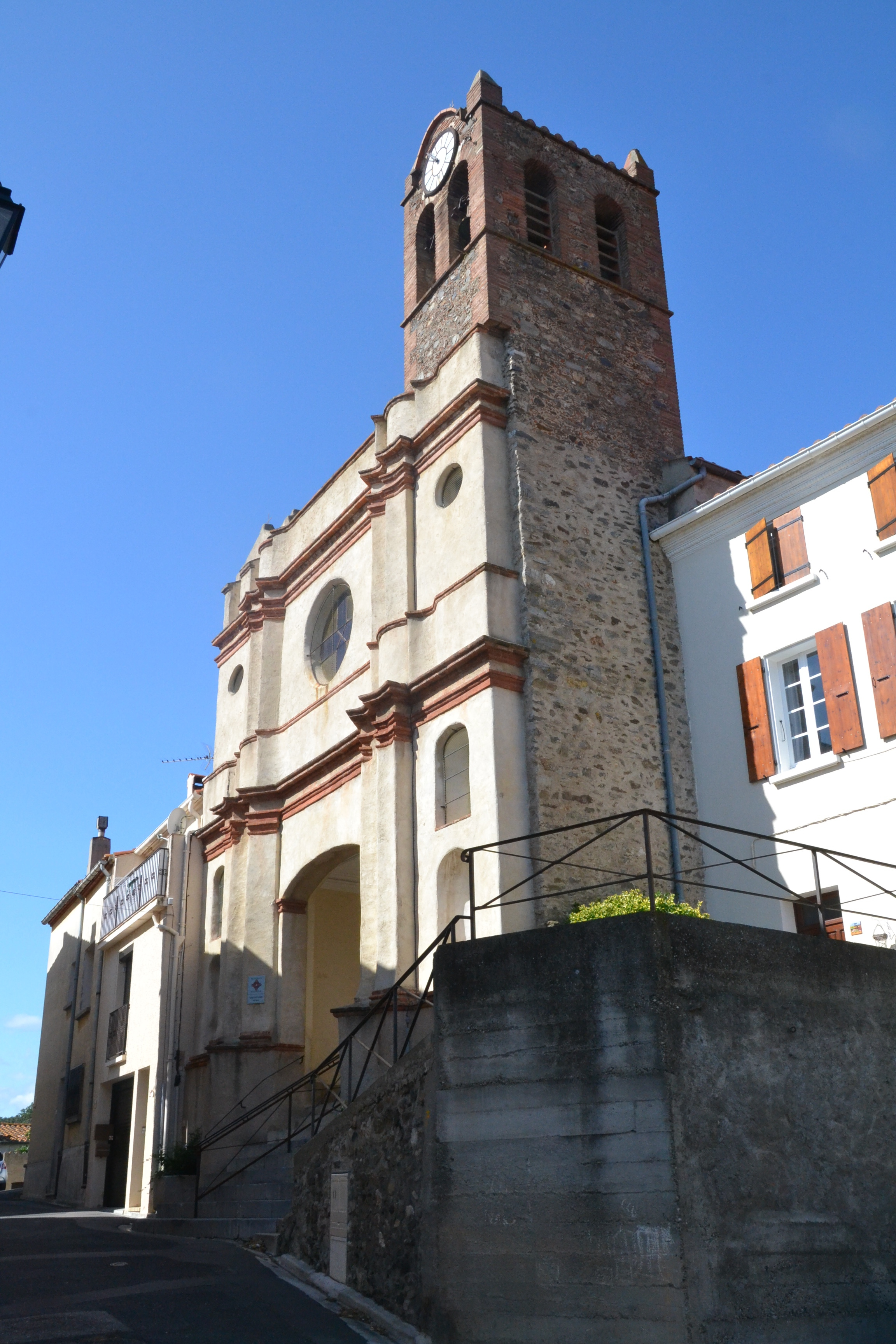 Eglise de Montner (P.-O., France)